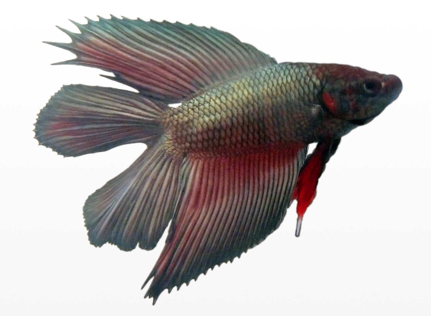 A male metallic double-tail Betta (Betta splendens)